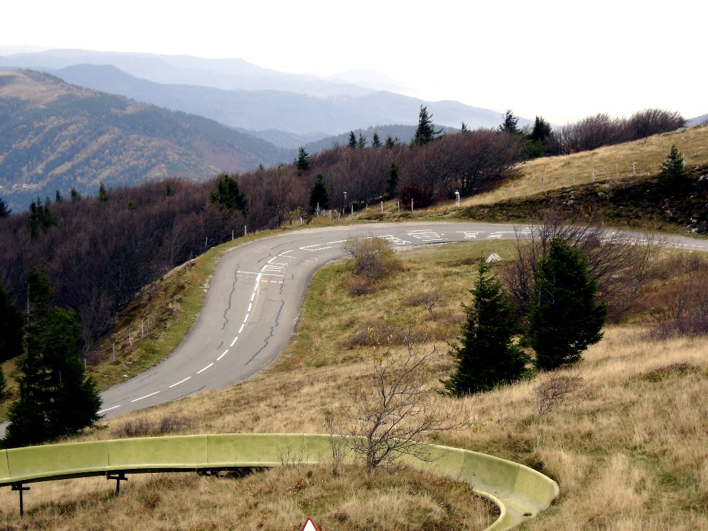 Vogesenkammstraße "Route des Crêtes" am Grand Ballon.